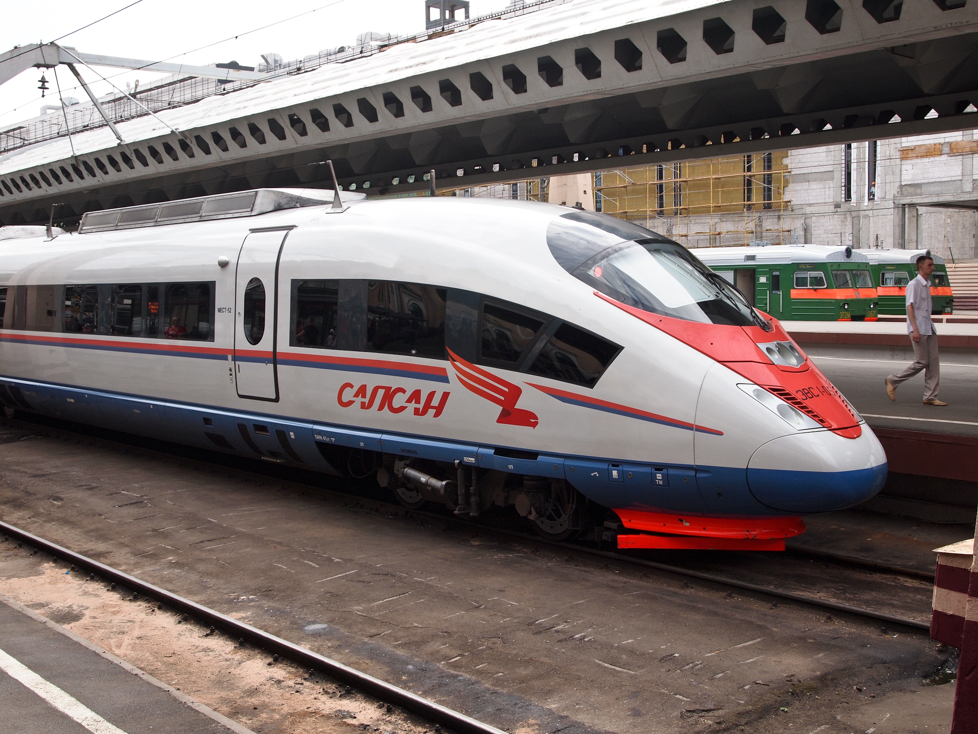 Сапсан на Московском вокзале.